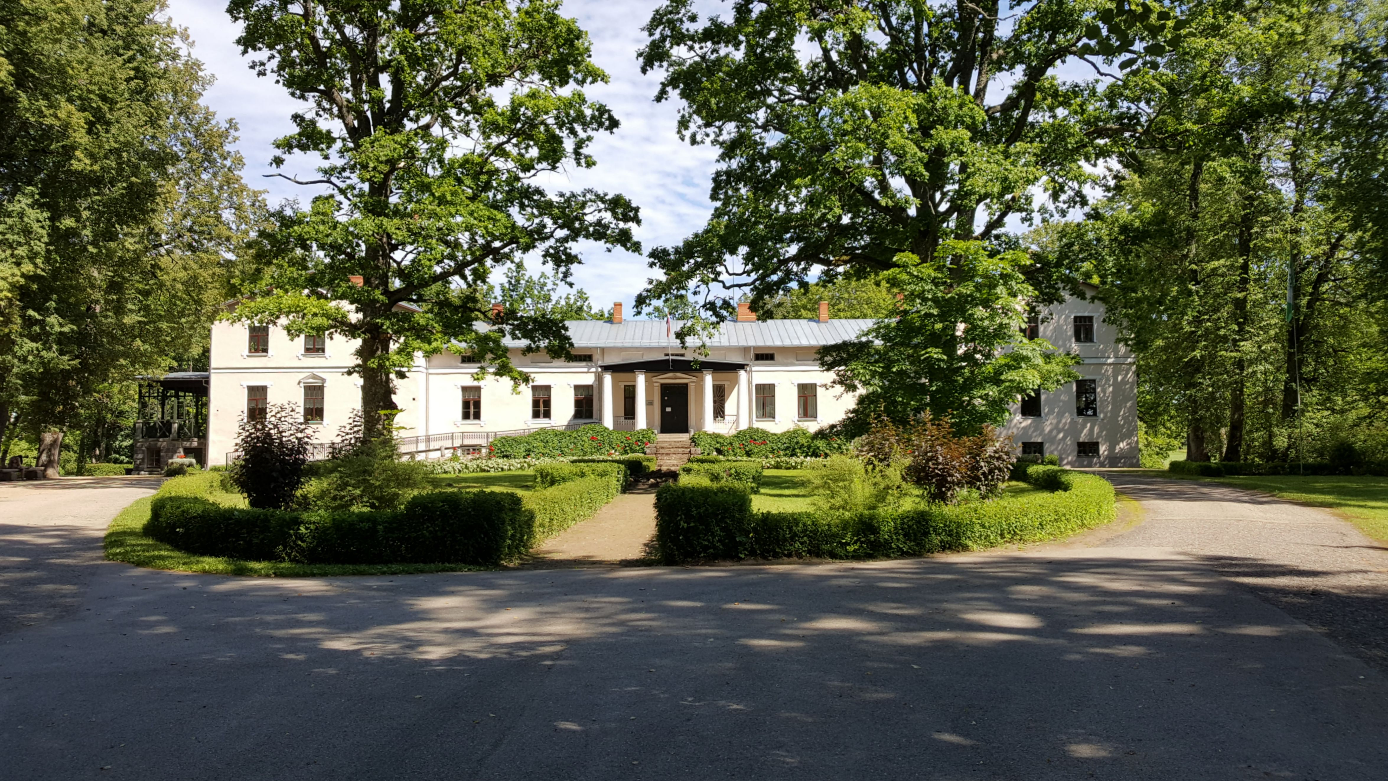 Vestiena mõisa peahoone 2017. aastal.